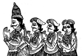 The Members of the Royal Family of Jaffna Cinkai Arya Cakravarti Pararacacekaran (VI) 1478-1519 Paddaththukkuriya Ilavarasan Pandaram Ilavarasan Paranirupasinghan Cinkai Arya Cakravarti Cankili Raja (I) Cekaracacekaran (VII) 1519-1561